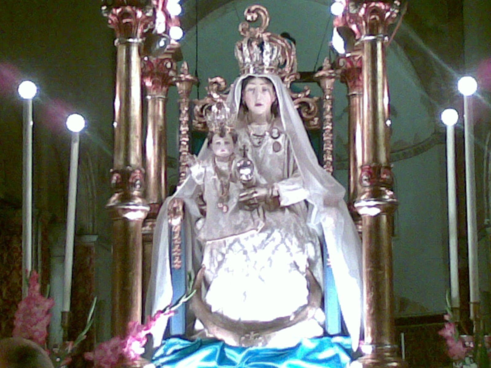 Foto scattata da me medesimo